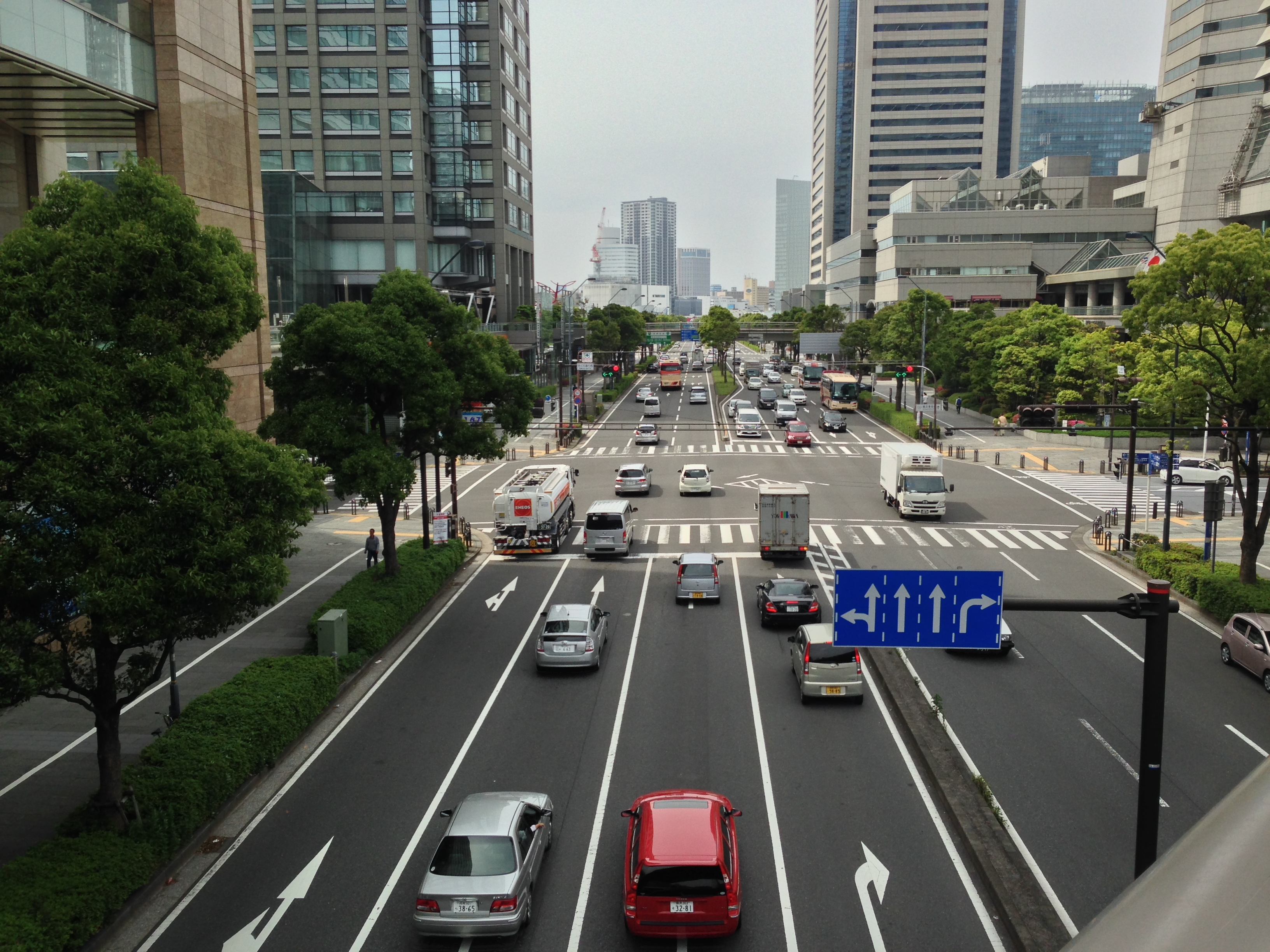 みなとみらい大通り（栄本町線）。動く歩道上より横浜ランドマークタワー方面を見る。